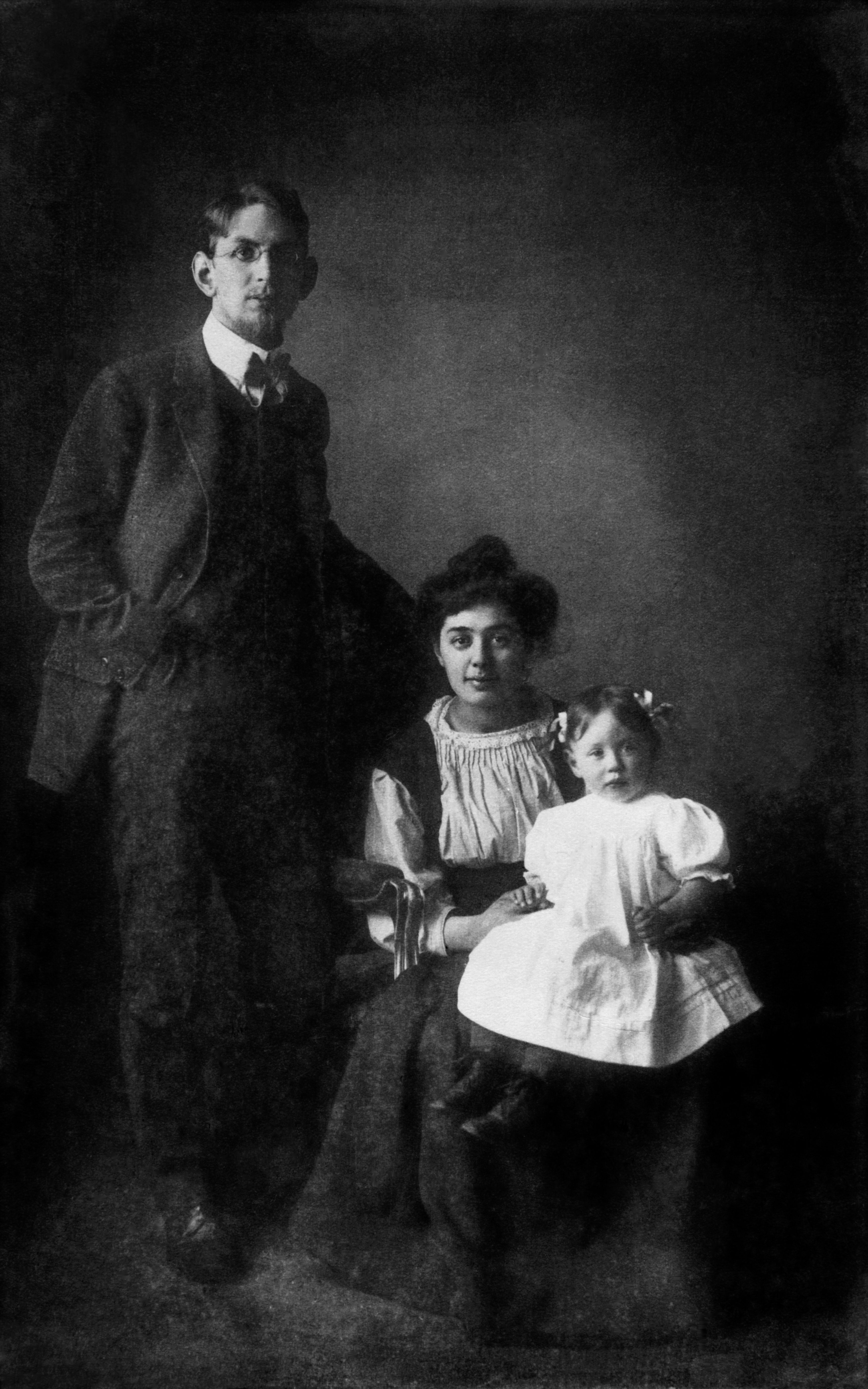 Yngve Larsson och Elin Larsson med dottern Verna.